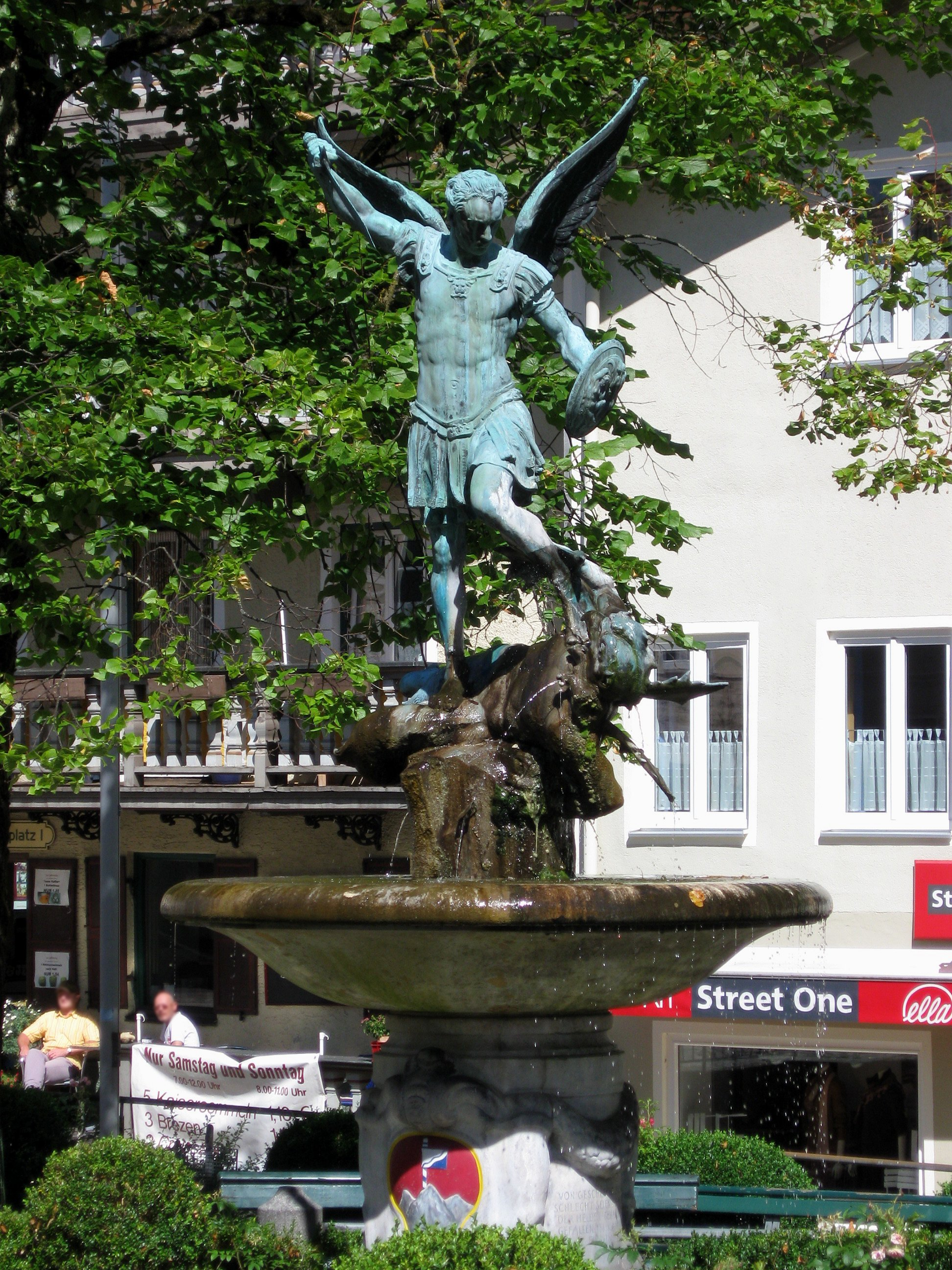 Stadtplatz; Stadtplatzbrunnen, Schalenbrunnen mit Figur des Hl. Michael, 1905 von Bernhard Bleeker. D-1-82-125-65